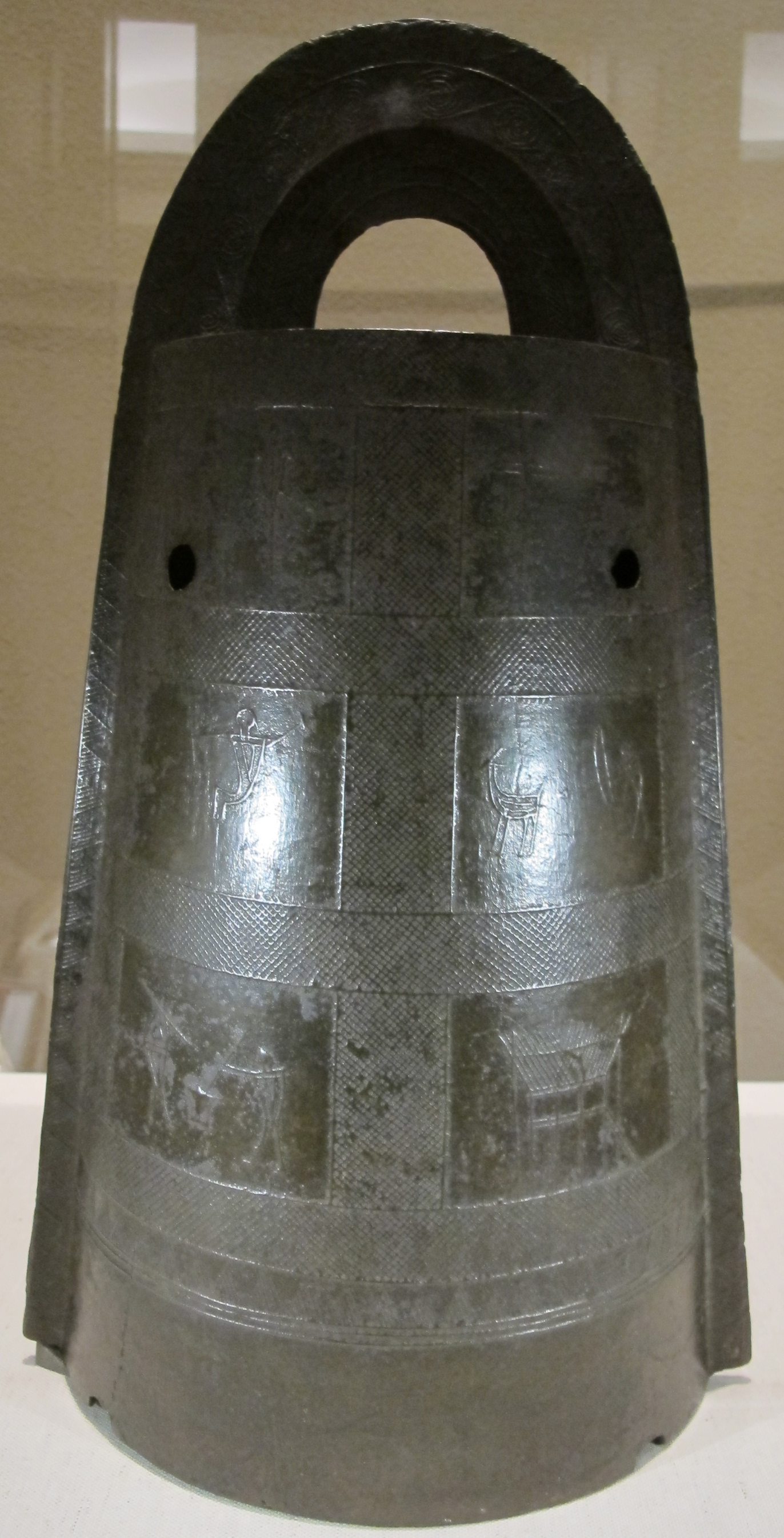 Periodo yayoi, dotaku (bronzo a forma di campana), II-I sec a.C.